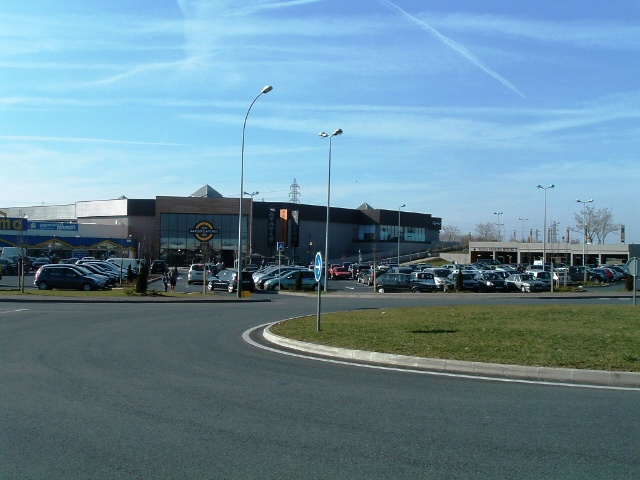 Centre commercial Marques Avenue A6 de Corbeil-Essonnes (91)